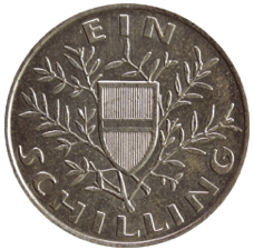 1 Schilling